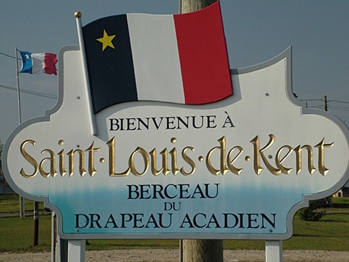 Panneau routier de bienvenue à Saint-Louis-de-Kent en Acadie dans le Nouveau-Brunswick.